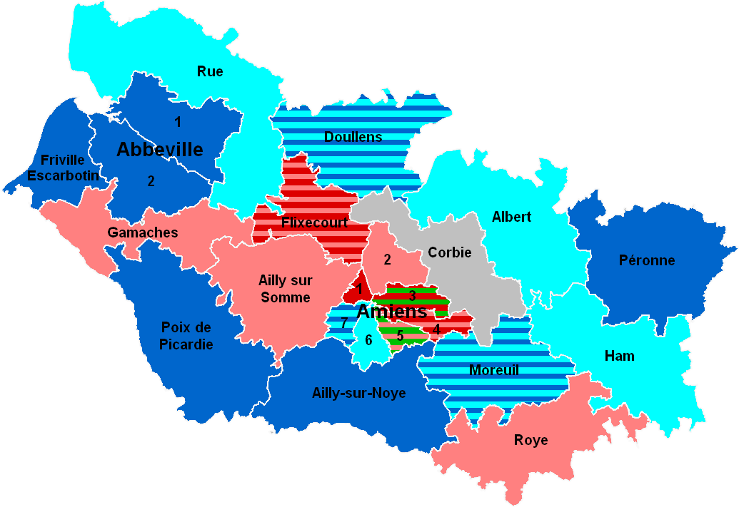 Couleur politique des cantons de la Somme en 2015